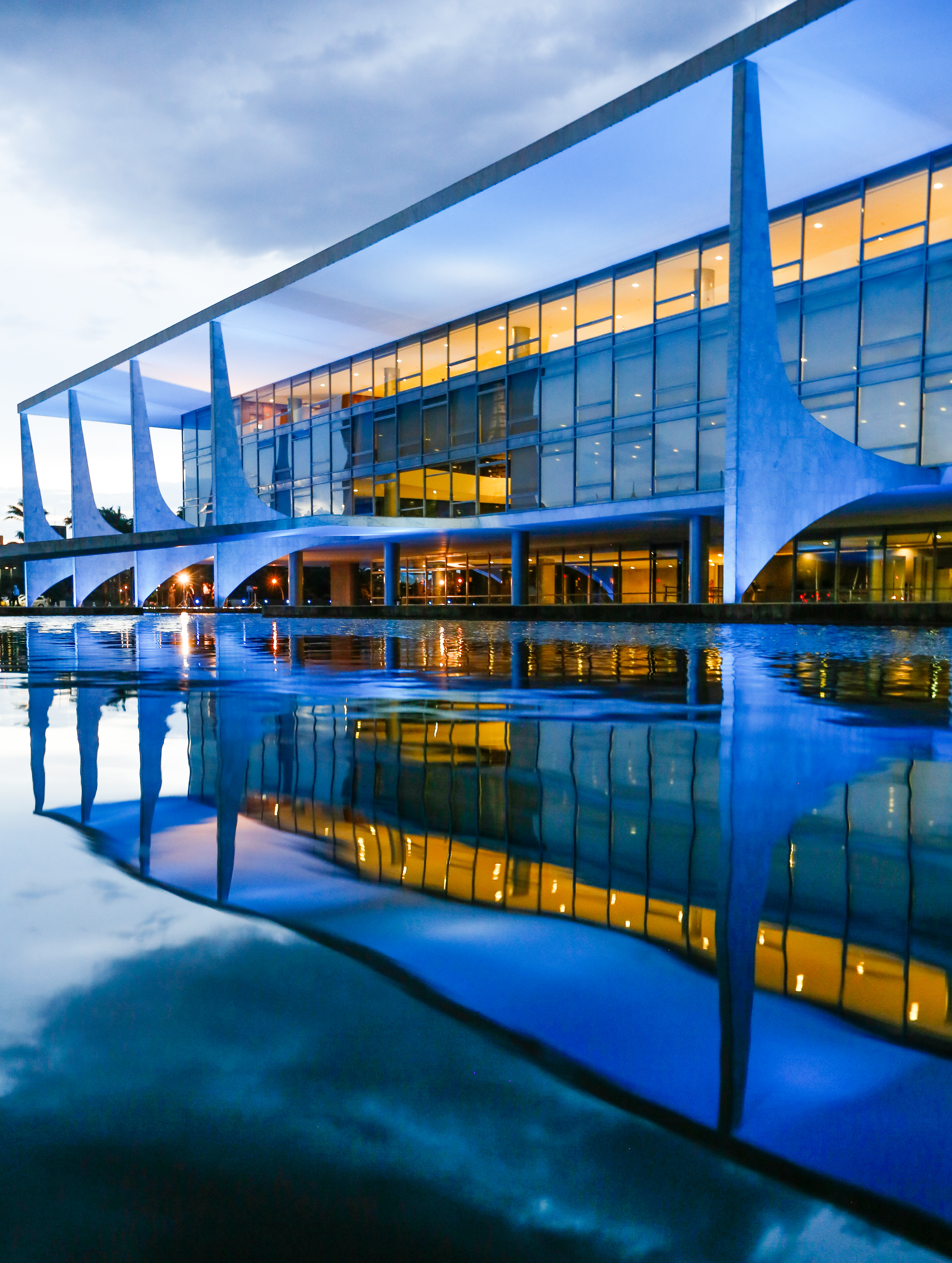 06-11-2014 Novembro Azul Foto: Anderson Riedel